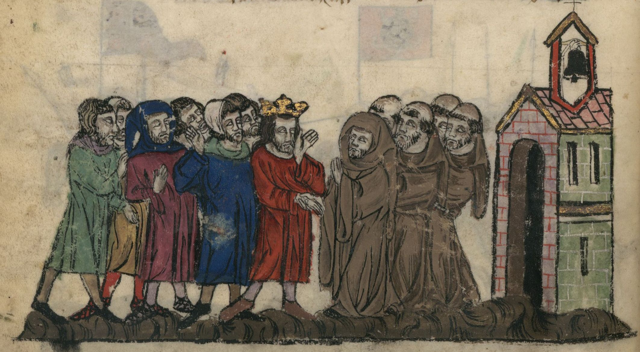 Hetoum I Entering The Orders